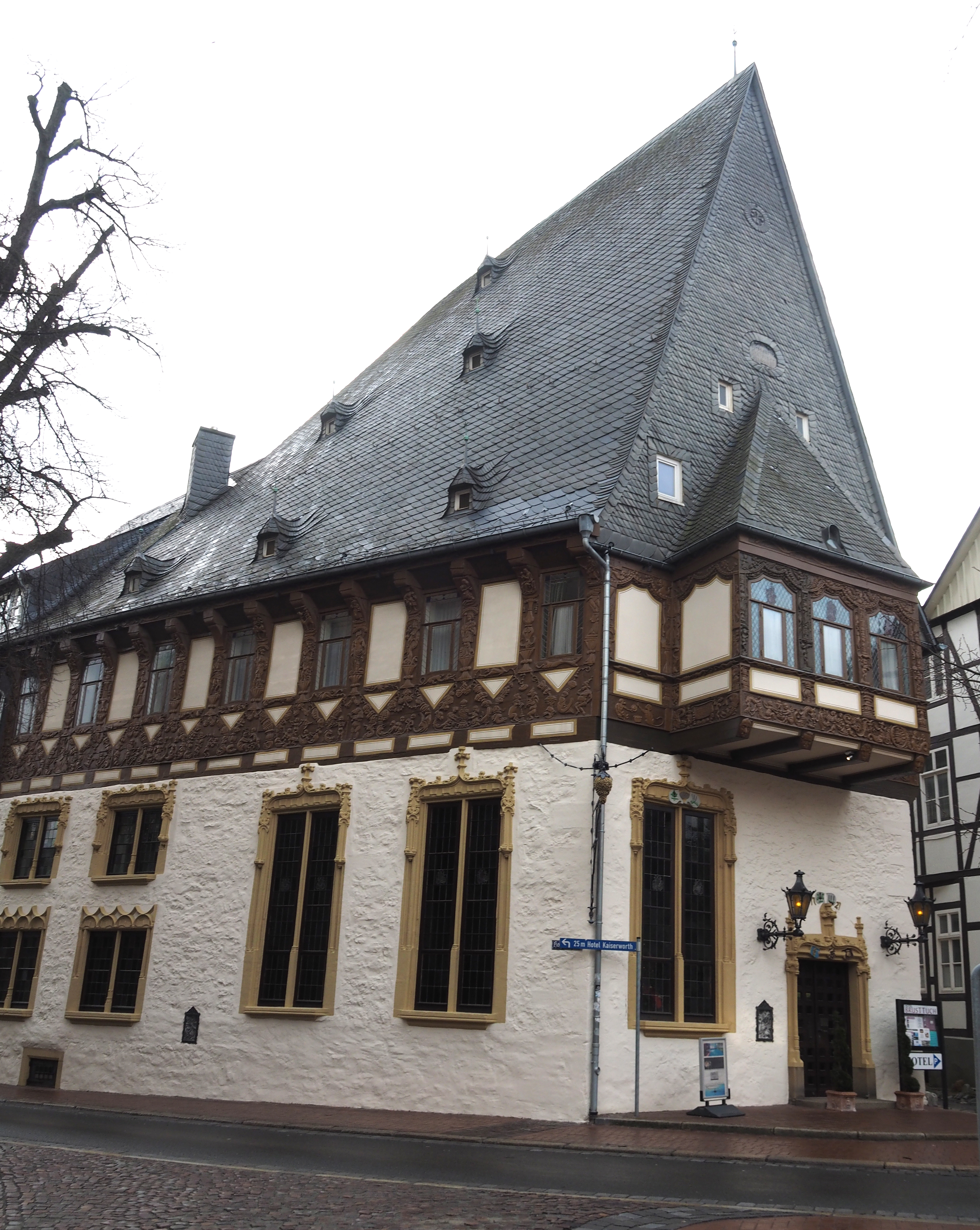 „Brusttuch“ (ehemaliges Patrizierhaus aus dem Jahre 1521) in Goslar (Harz)